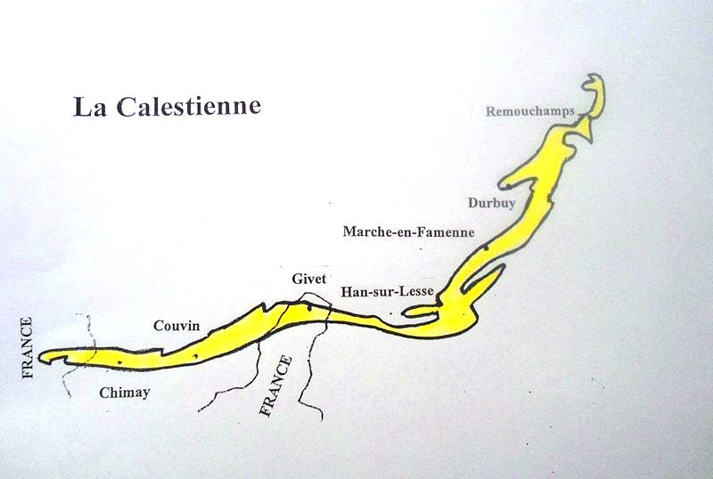 Carte de la Calestienne